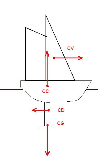 Schéma d'illustration de la disposition des différent centres d'un voilier suivant le plan vertical ou axe de tangage